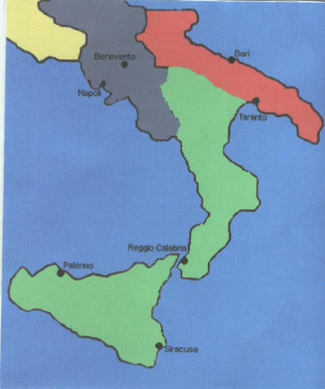 Le conquiste in Italia sotto il regno di Manuele I di Bisanzio.